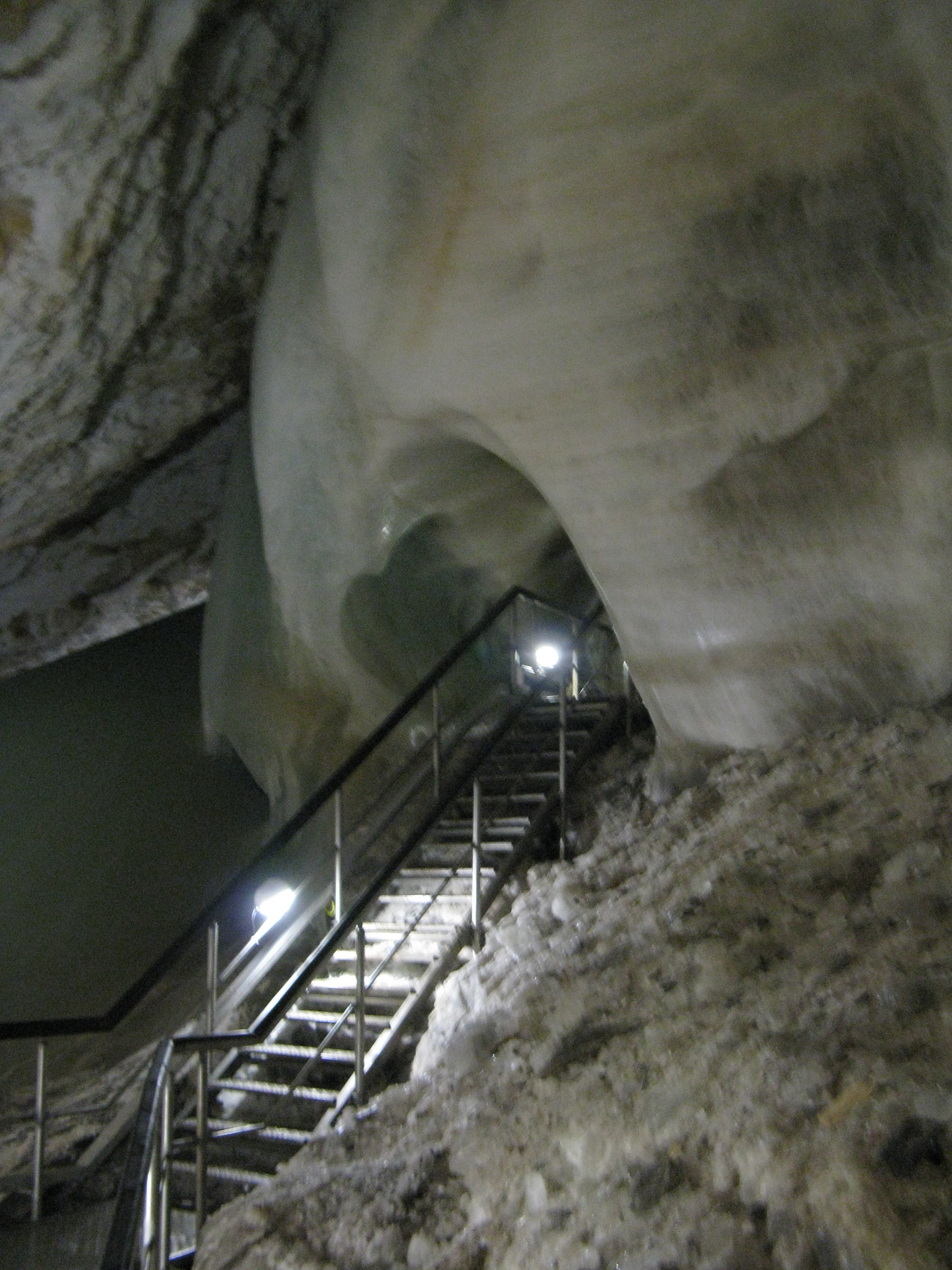 Dobšinská ľadová jaskyňa